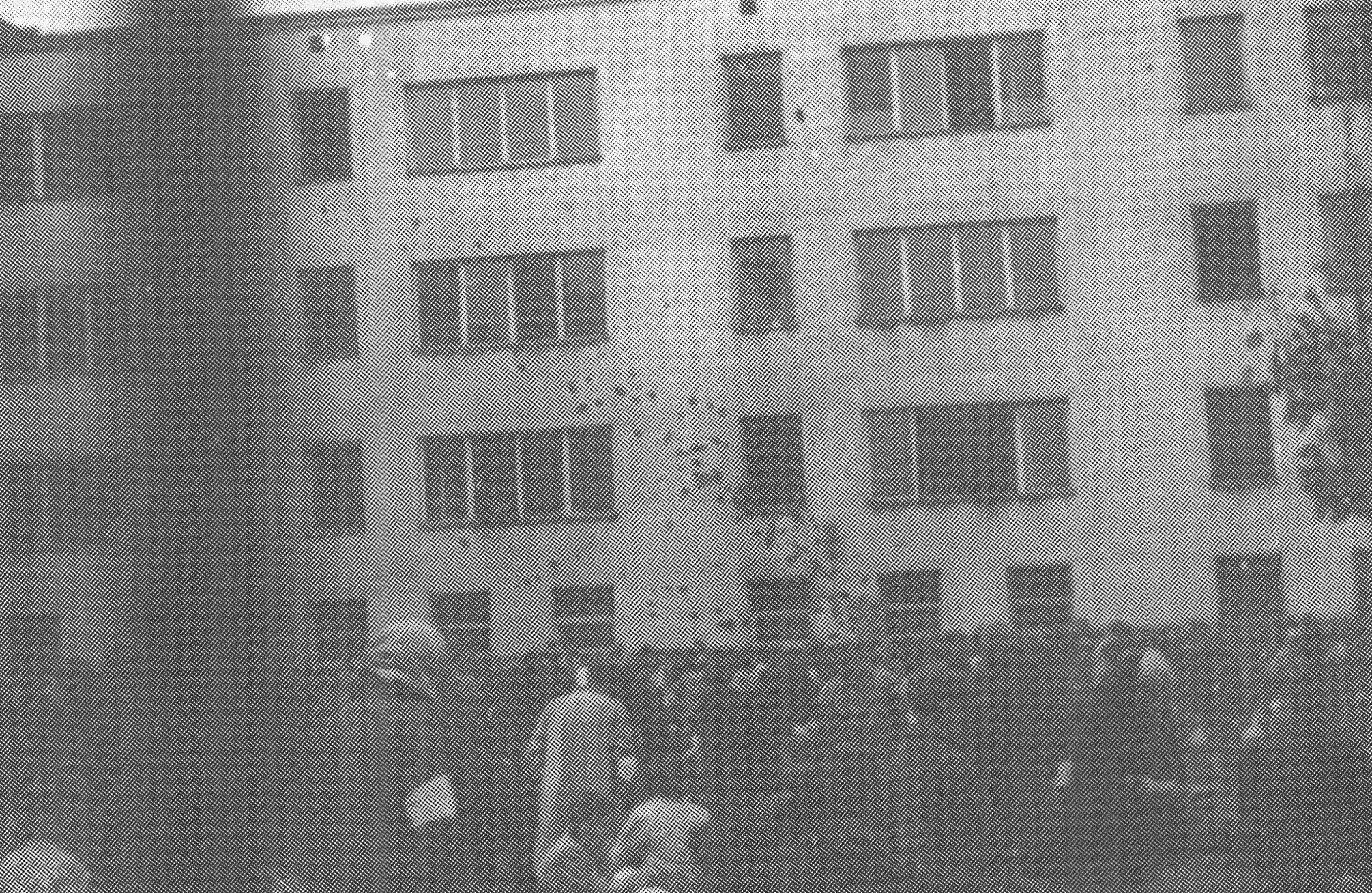 Żydzi czekający na Umschlagplatzu na dziedzińcu szkoły powszechnej